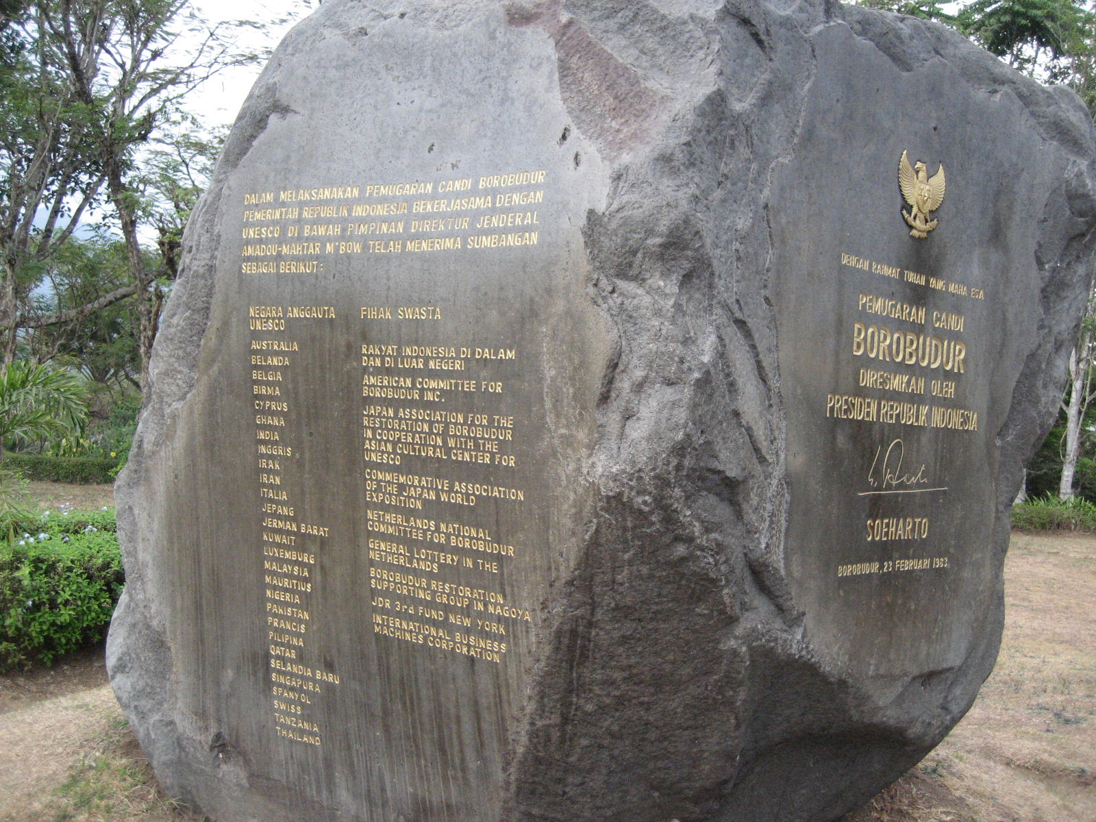 Batu peringatan pemugaran candi Borobudur